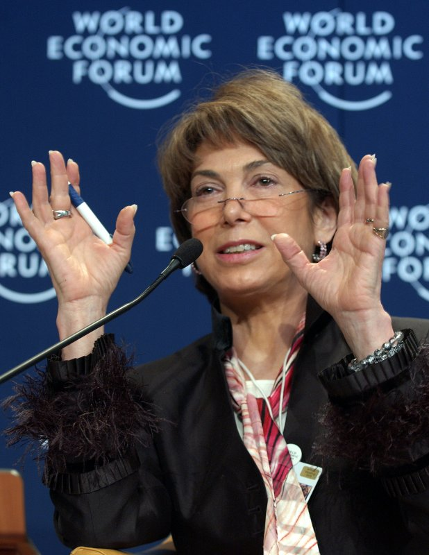 Laura Tyson